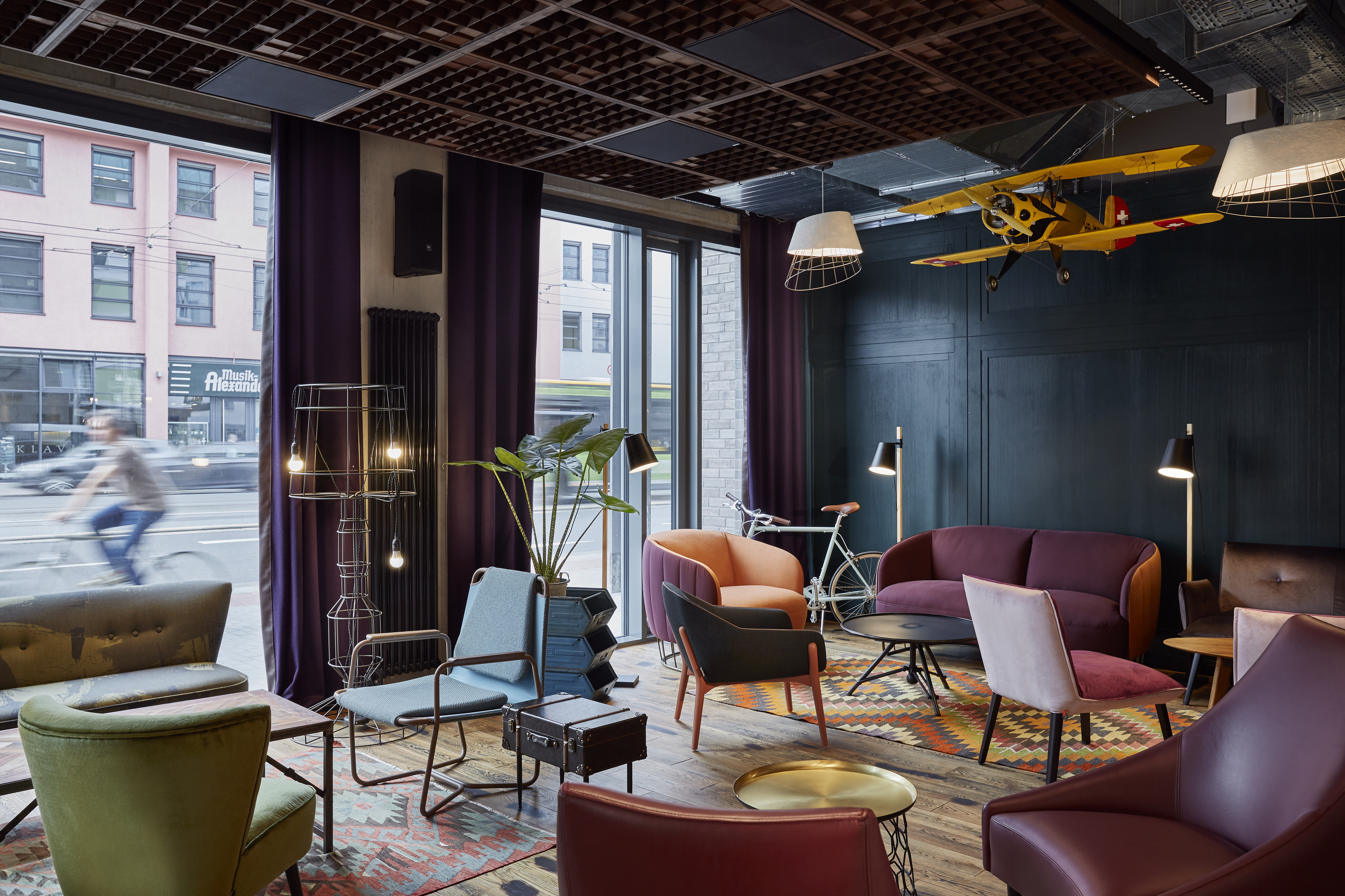 Lounge im me and all hotel mainz